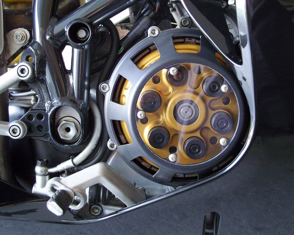 Kupplungsdeckel, offen mit Plexiglasscheibe (an Ducati 999)